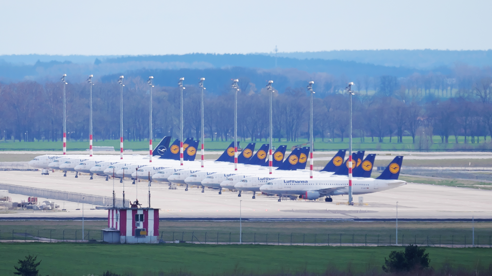 15 am 21. März 2020 auf dem Großflughafen BER abgestellte Flugzeuge der Lufthansa gesehen vom Rudower Dörferblick.